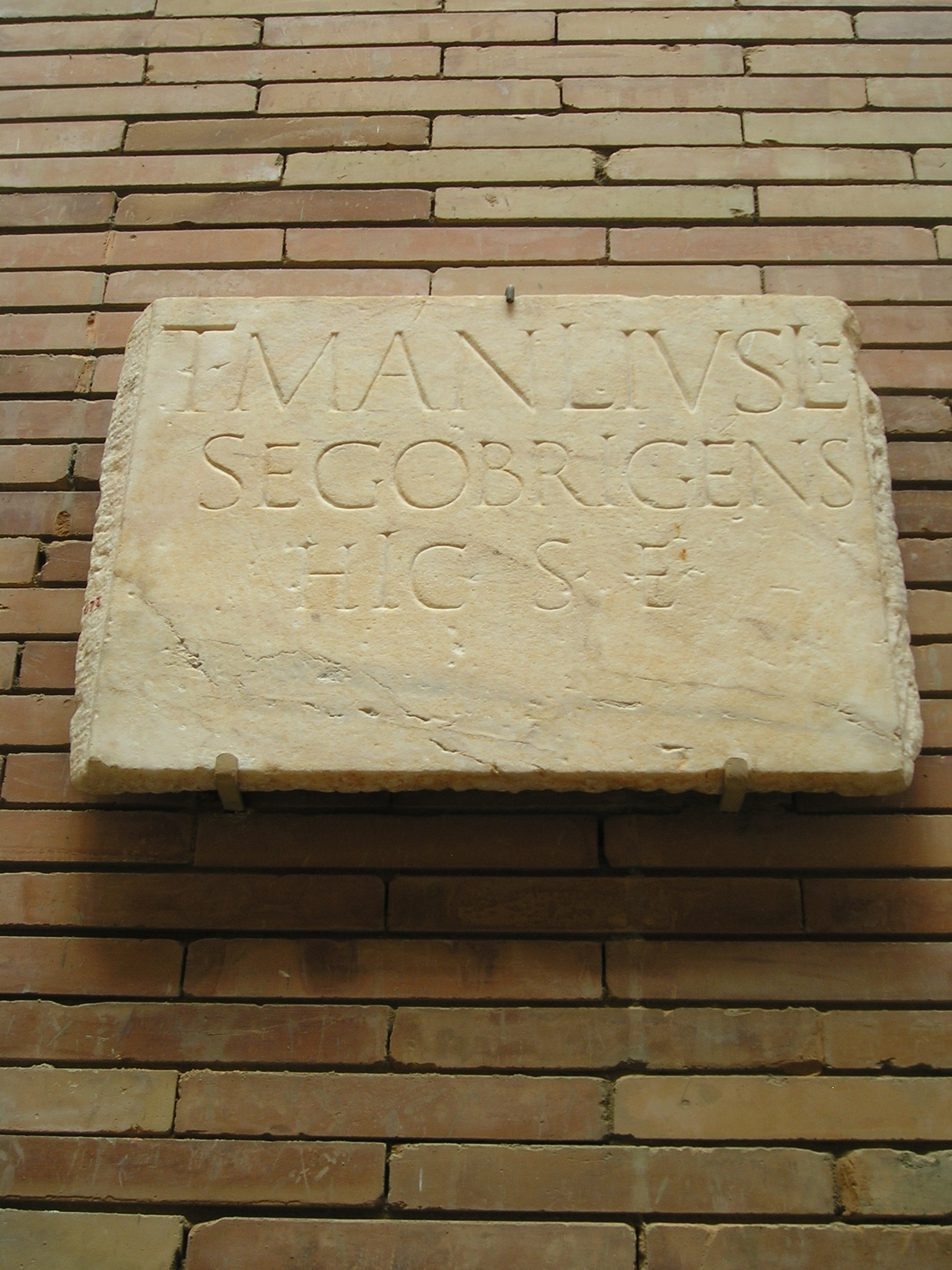 Inscripción funeraria romana procedente de Mérida (Badajoz, España) deposita en el Museo Nacional de Arte Romano de la localidad, correspondiente con ERAEmerita 192: T(itus) Manlius L(uci) f(ilius) / Segobrigens(is) / hic s(itus) e(st)